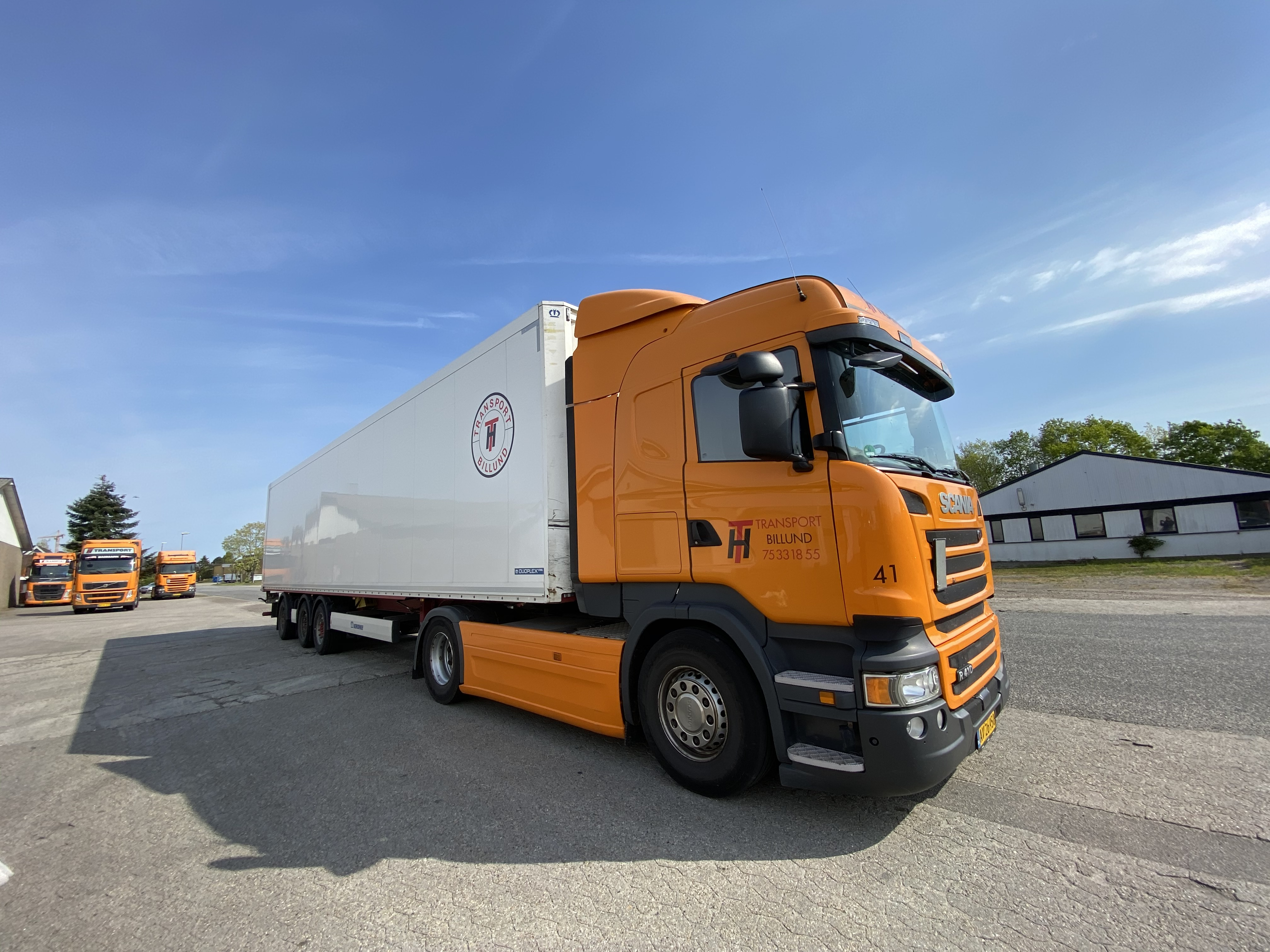 HT Trækker og trailer